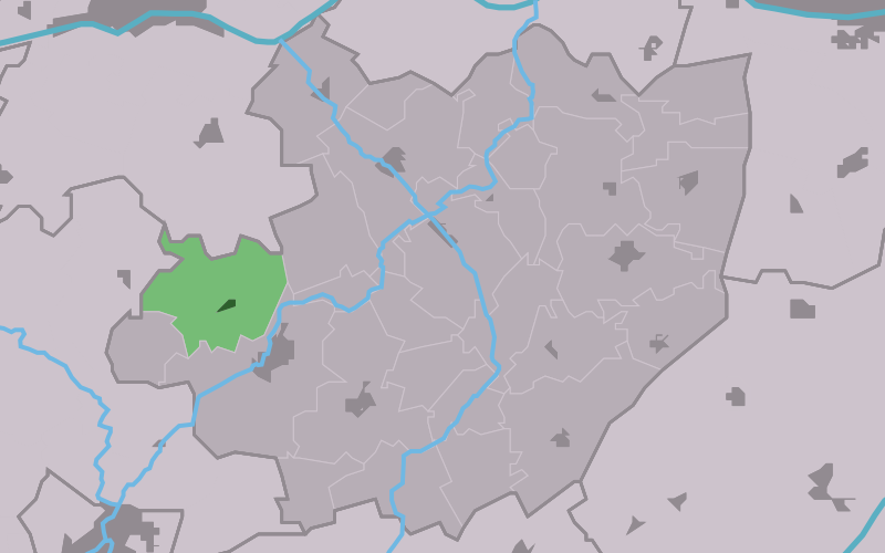 Kaartsje fan himrik fan Kûbaard